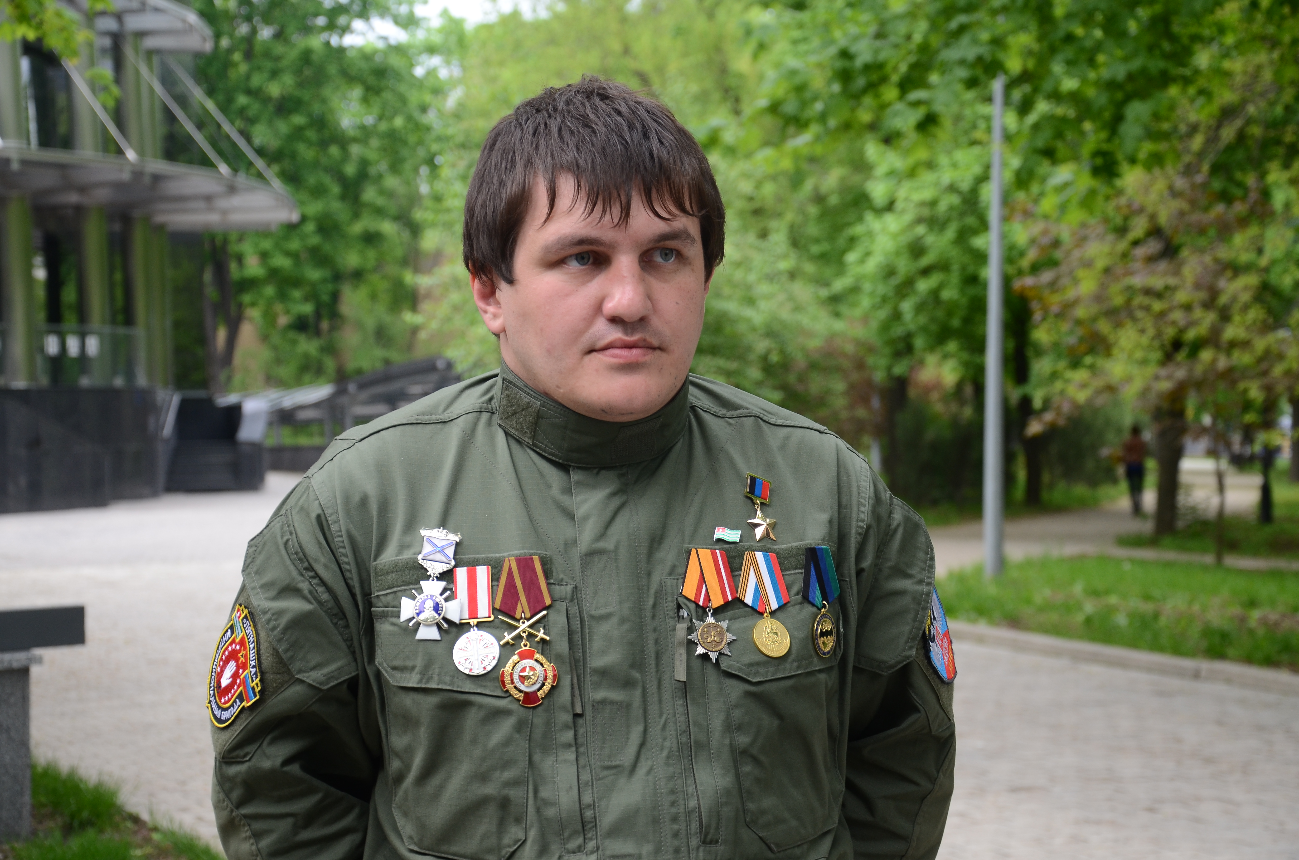 День Победы в Донецке